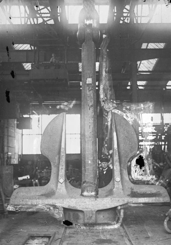 Der 6 m grosse Anker eines Ozeanriesen! Der Riesenanker des 46.000 to Ozeanriesen "Bremen". Der Anker hat ein Gewicht von 15.000 kg und ist 6 m hoch.